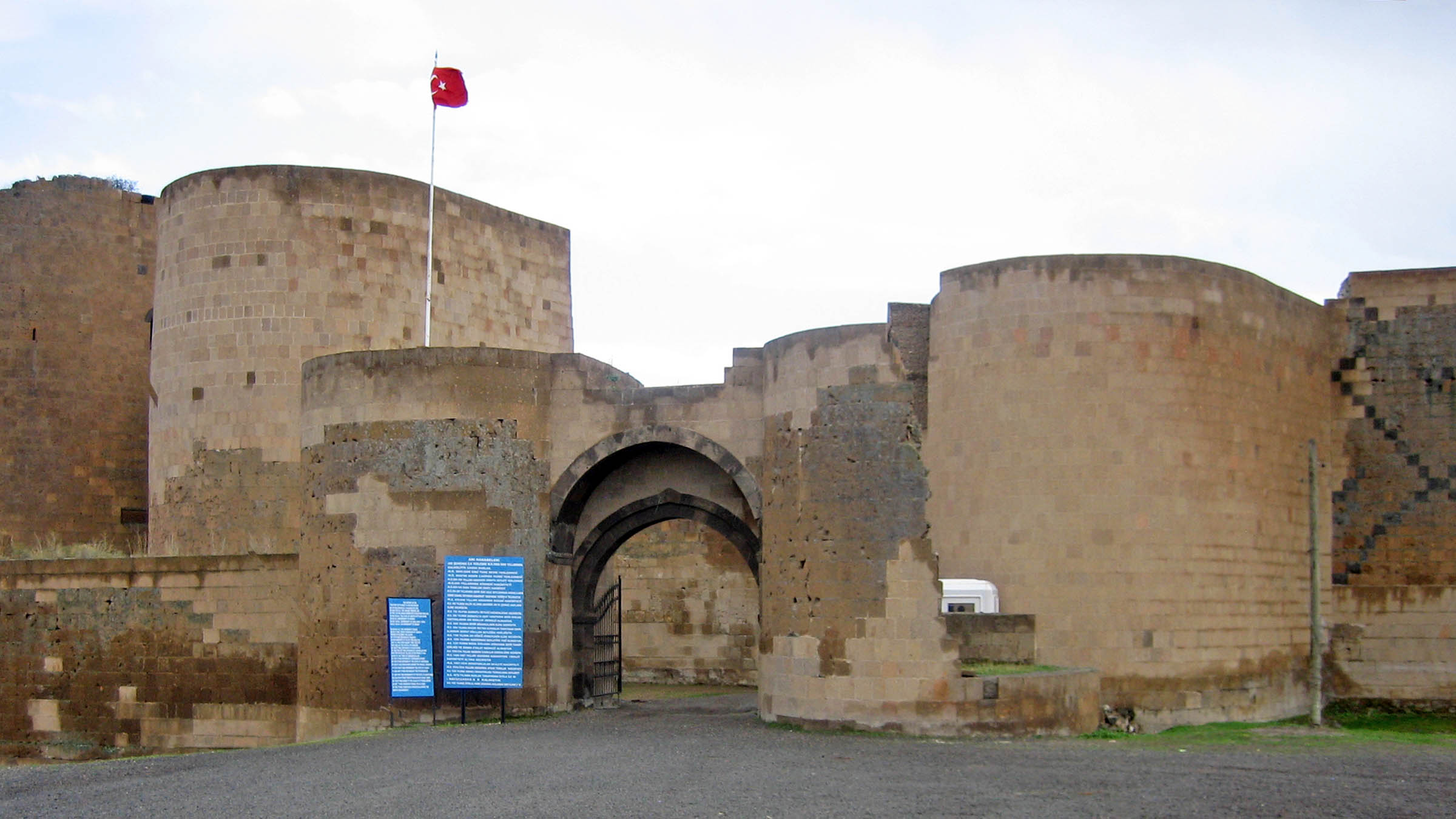 Ani'nin Kuzey giris kapisi